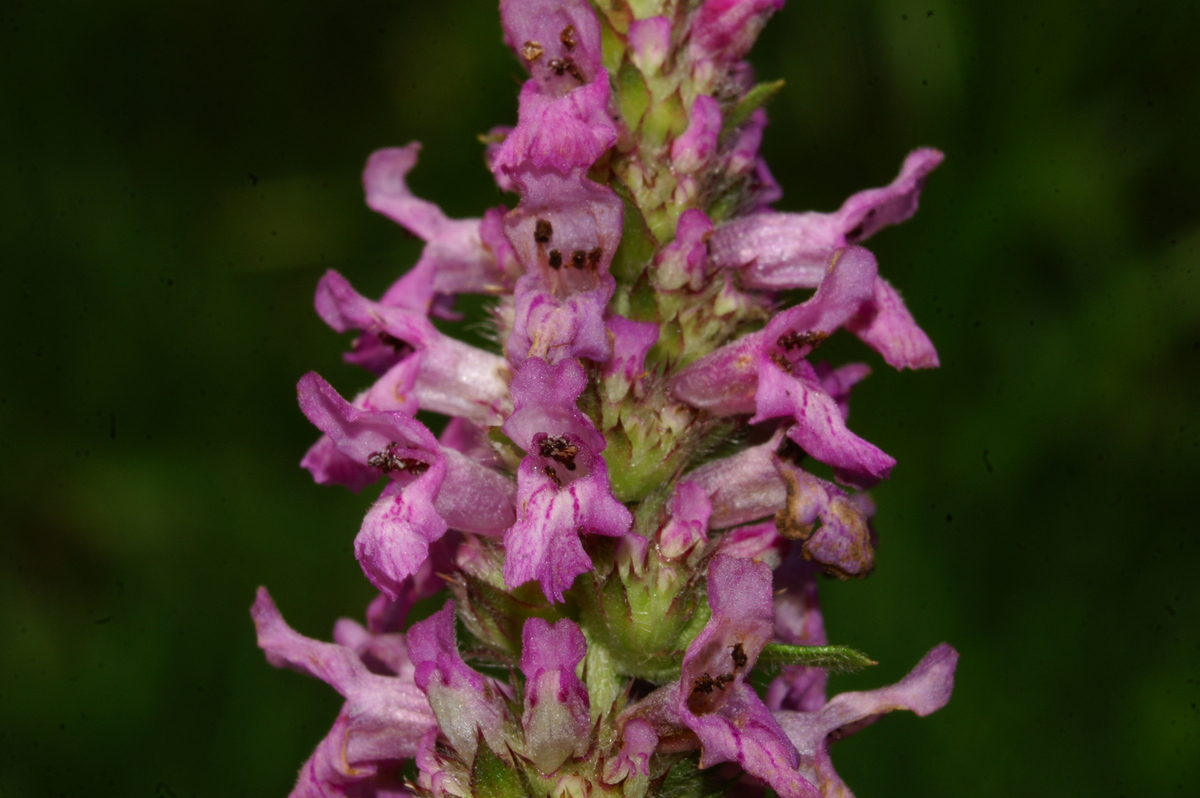 Navadni čistec v Volčjem potoku.